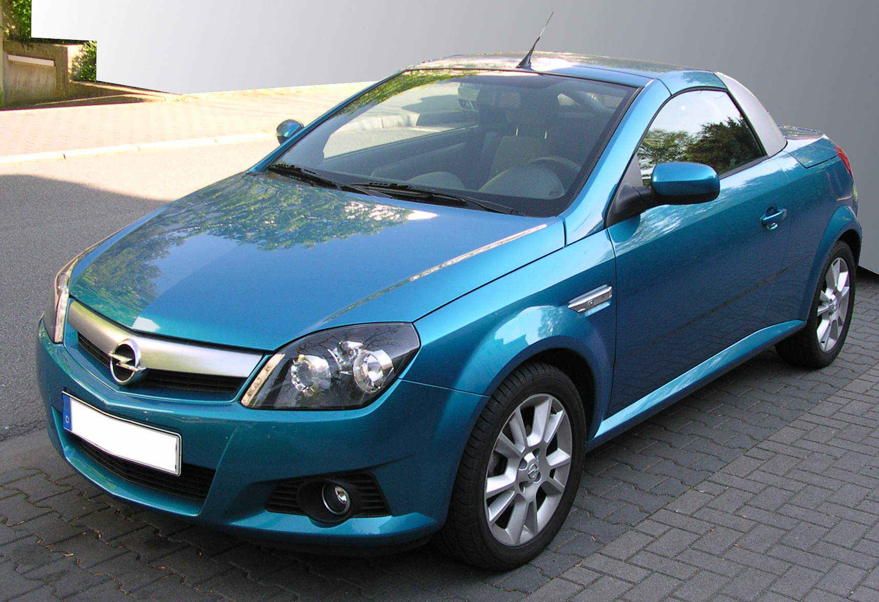 Opel Tigra, 2. Generation